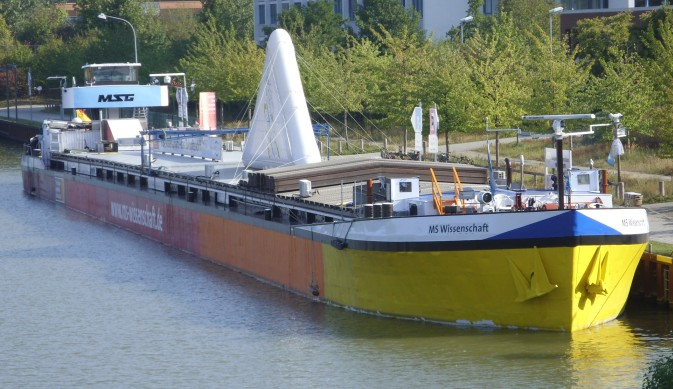 Binnenschiff „JENNY“ als „MS WISSENSCHAFT“ (2009: Wissenschaftsjahr „Zukunft“)